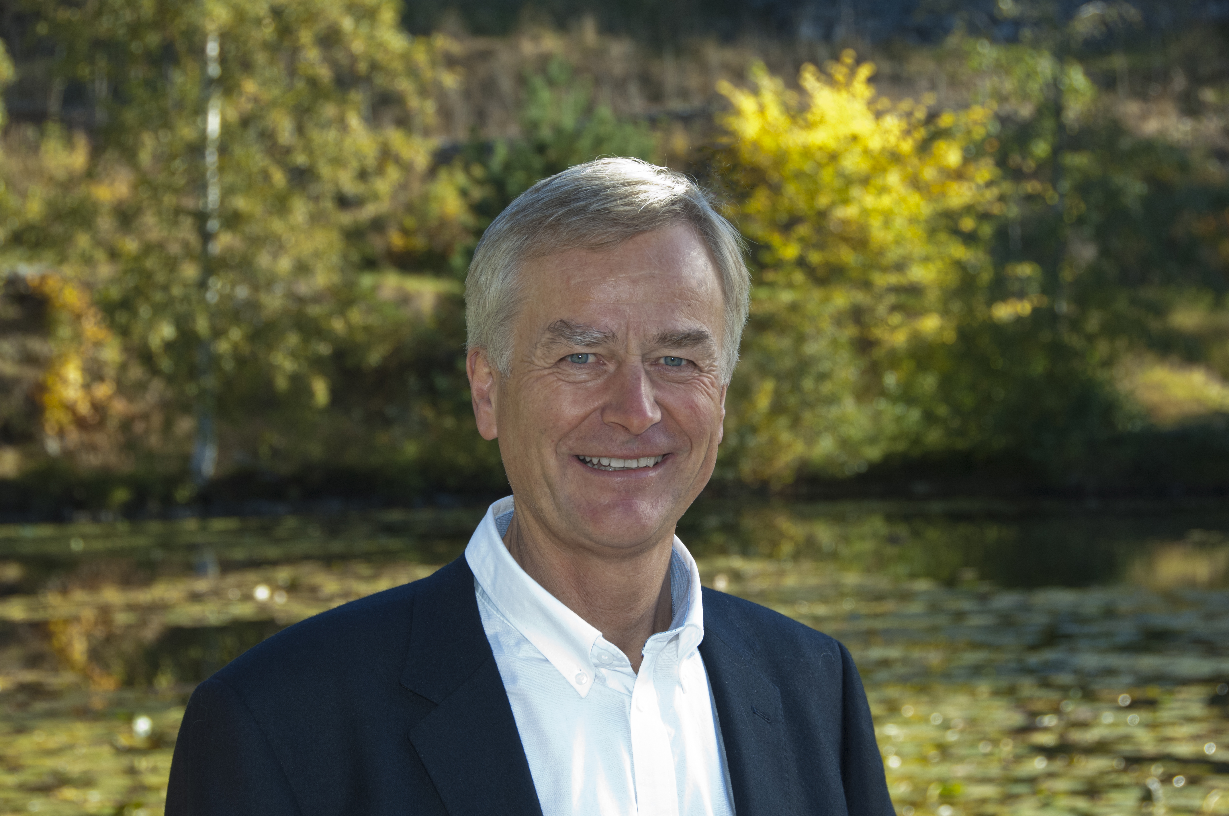 Jostein Skurdal fotografert på Maihaugen. Foto: Audbjørn Rønningn / Stiftelsen Lillehammer museum